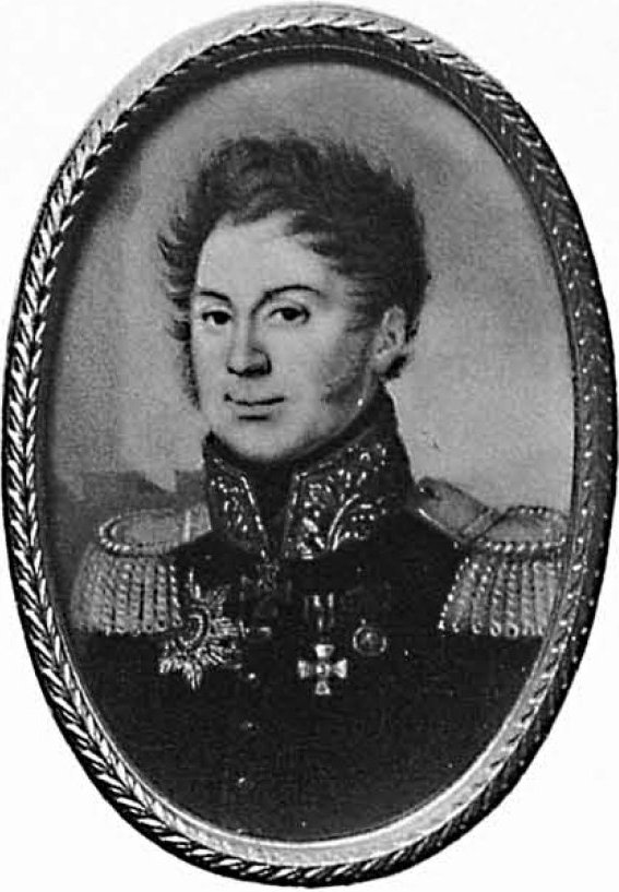 Николай Дмитриевич Олсуфьев (1775-1817) This image is available from the New York Public Library's Digital Library under the digital ID 1230507 This tag does not indicate the copyright status of the attached work. A normal copyright tag is still required. See Commons:Licensing for more information. English | français | русский | Türkçe | 中文 |+/−